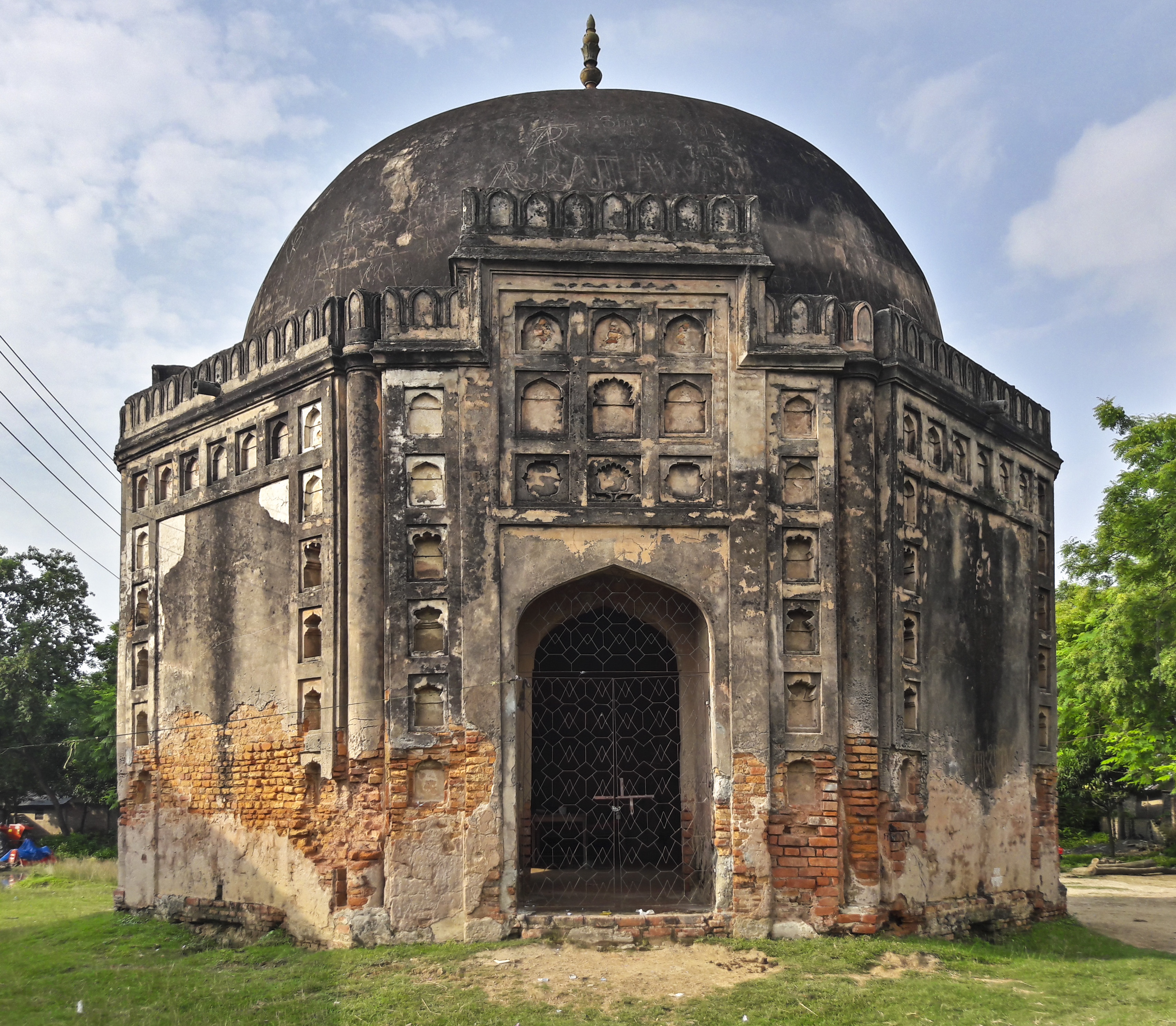 রহনপুর অষ্টভূজি ইমারত যা রহনপুর প্রাচীন সৌধ নামে পরিচিত। এটি গৌড়িয় আমলের অন্যতম প্রাচীন নিদর্শন। এটি বাংলার মুসলিম স্থাপত্যের ইতিহাসে সর্বপ্রথম অষ্টভূজি ভবনের নিদর্শন।